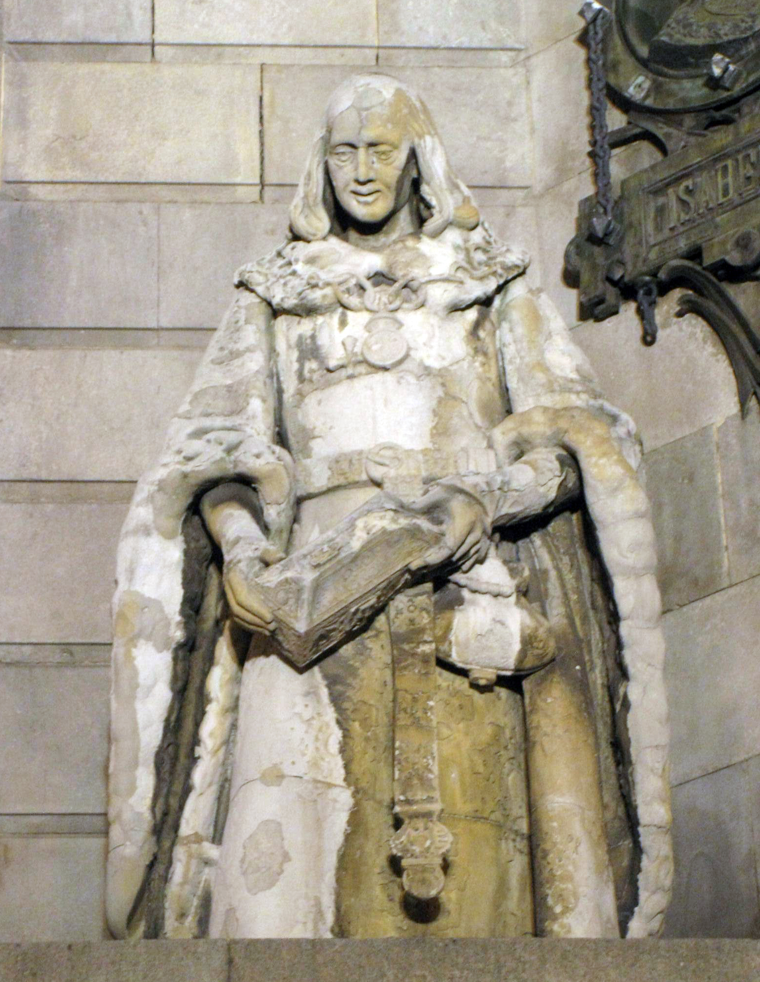 Lluís de Santàngel (Giovanni Passani). Portal de la Pau, monument a Colom (Barcelona)